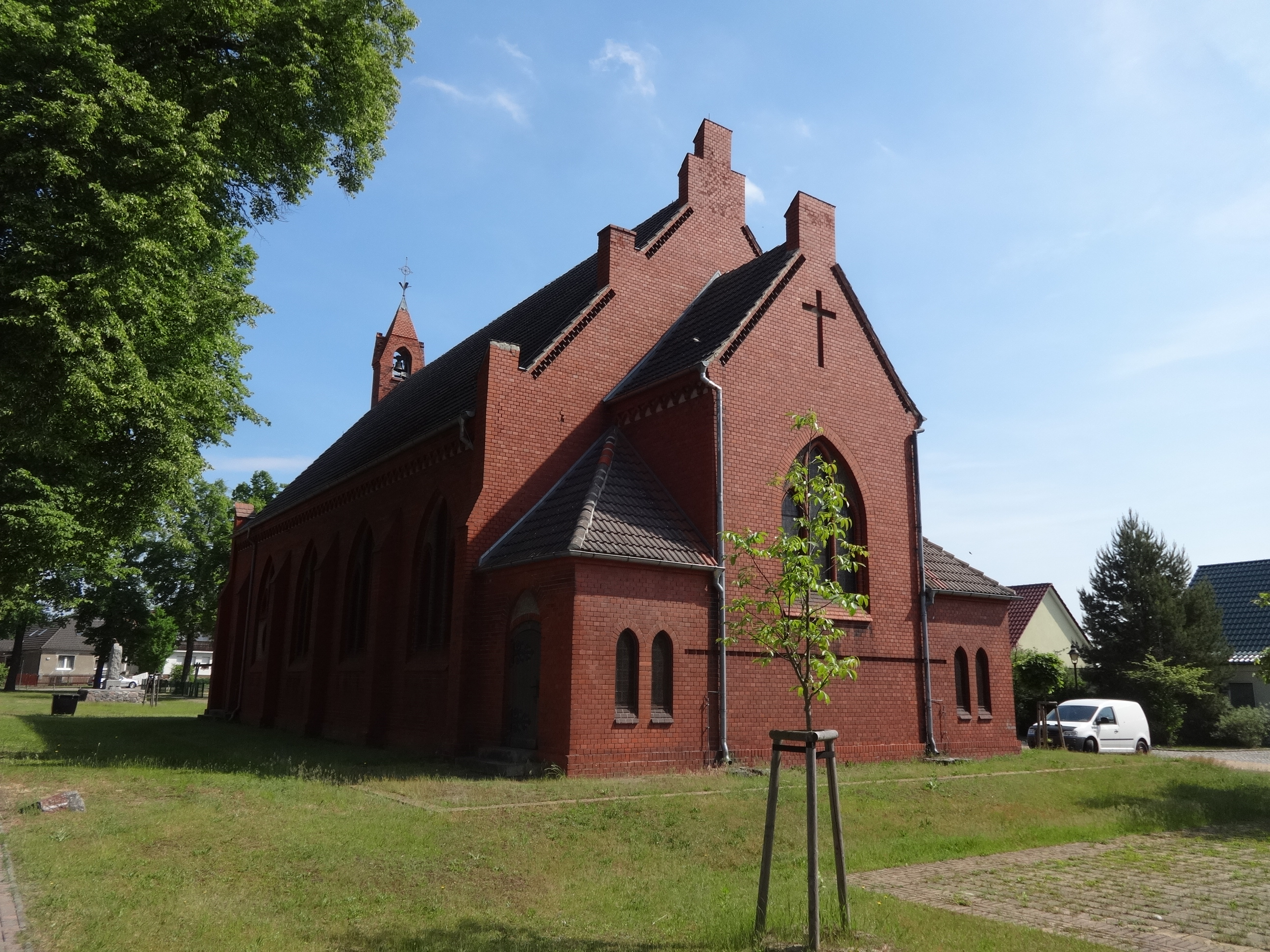 Die evangelische Dorfkirche Töpchin ist ein neugotischer Sakralbau aus den Jahren 1893 und 1894 in Mittenwalde in Brandenburg. Die schlichte Ausstattung stammt aus der Bauzeit der Kirche. Das hölzerne Kruzifix auf dem Altar ist eine Stiftung des Ziegeleibesitzers Selchow. Die Orgel auf der Westempore baute Albert Hollenbach aus Neuruppin. Sie besitzt zwei Manuale, ein Pedal und hat 15 Register.